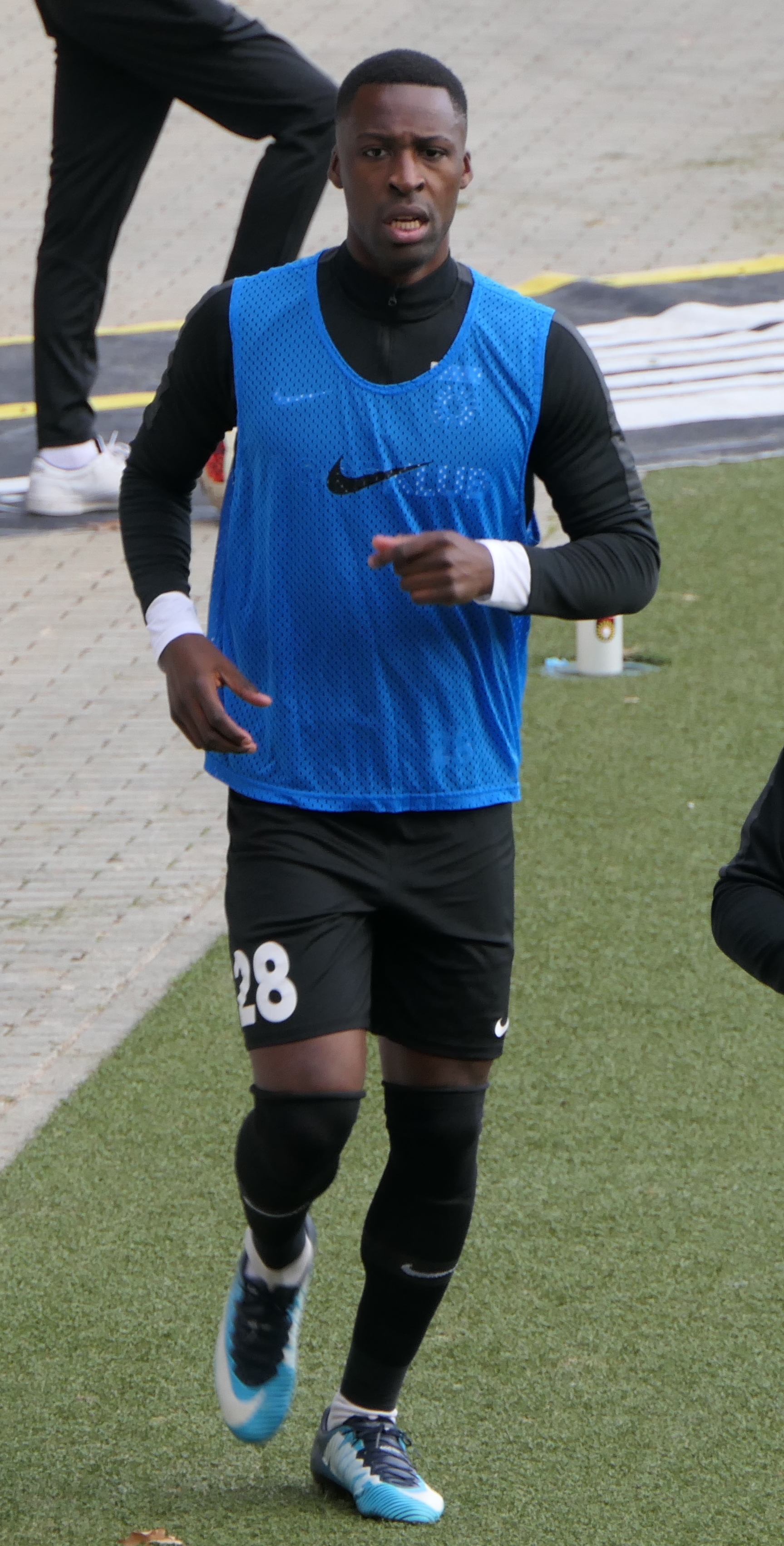 Der Fussballprofi Stephane Mvibudulu von der SG Sonnenhof Großaspach beim Heimspiel gegen Eintracht Braunschweig am 03.11.2018.